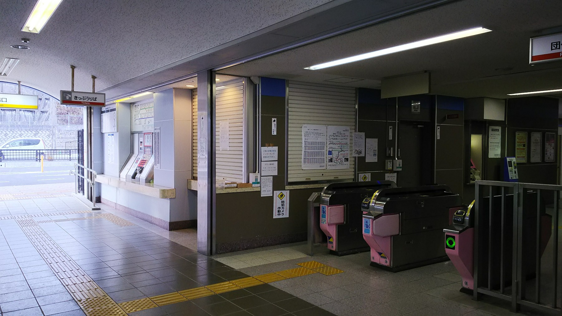 御幸辻駅出改札口